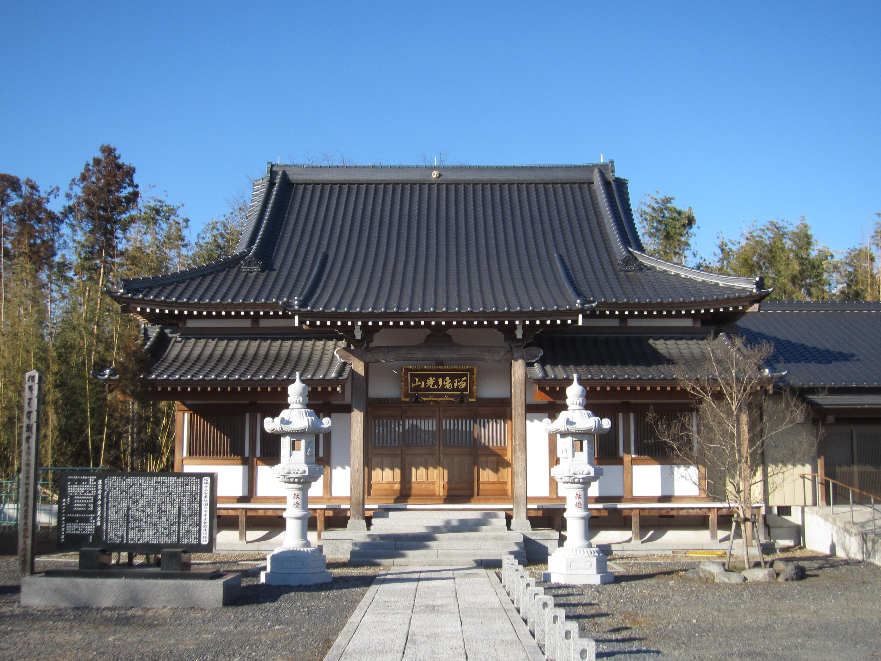 下野国分寺 本堂